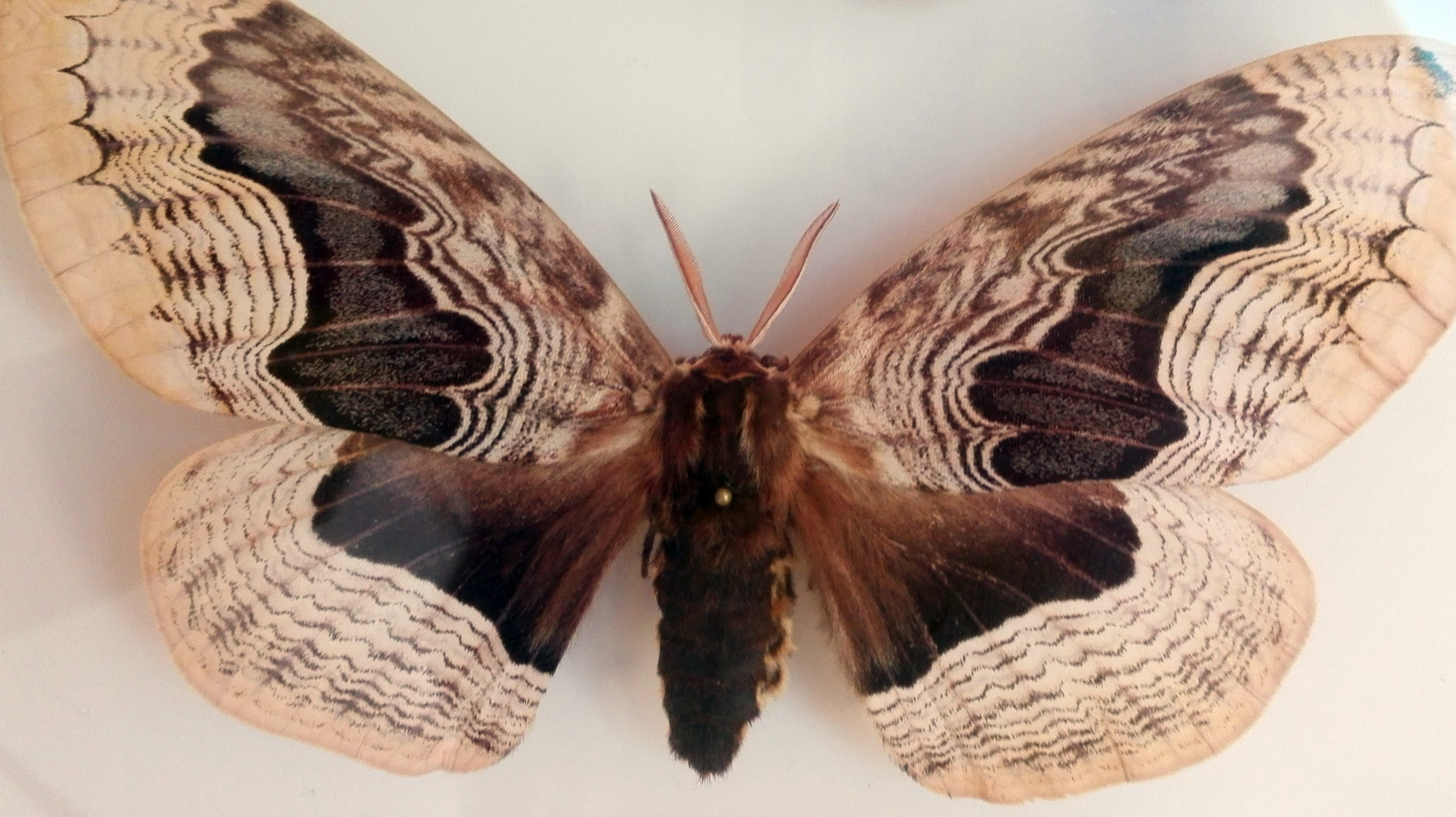 Brahmaea tancrei